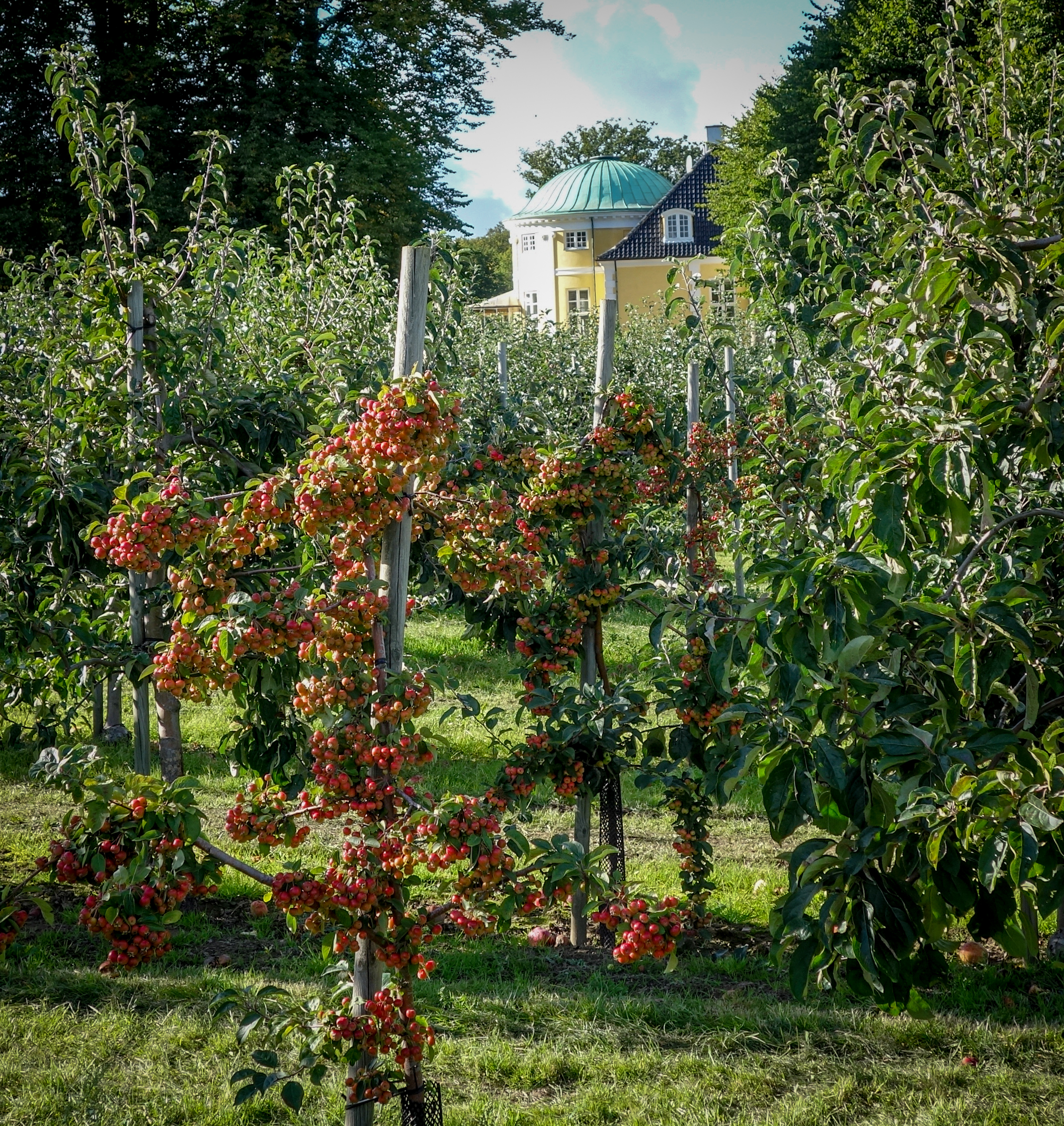 Frydenlund in Vedbæk, Denmark